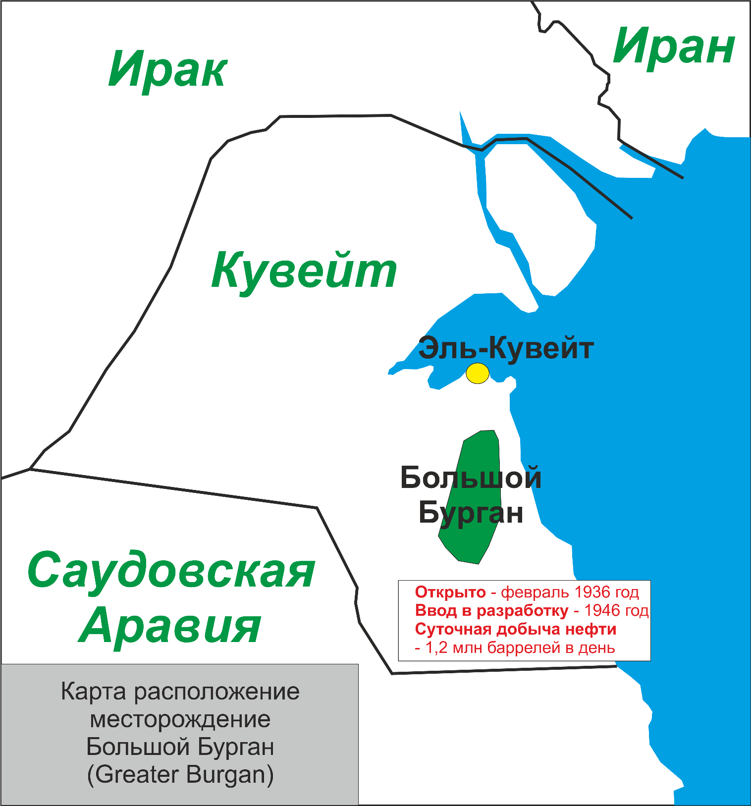 Карта расположение кувейтского гигантского месторождение нефти.